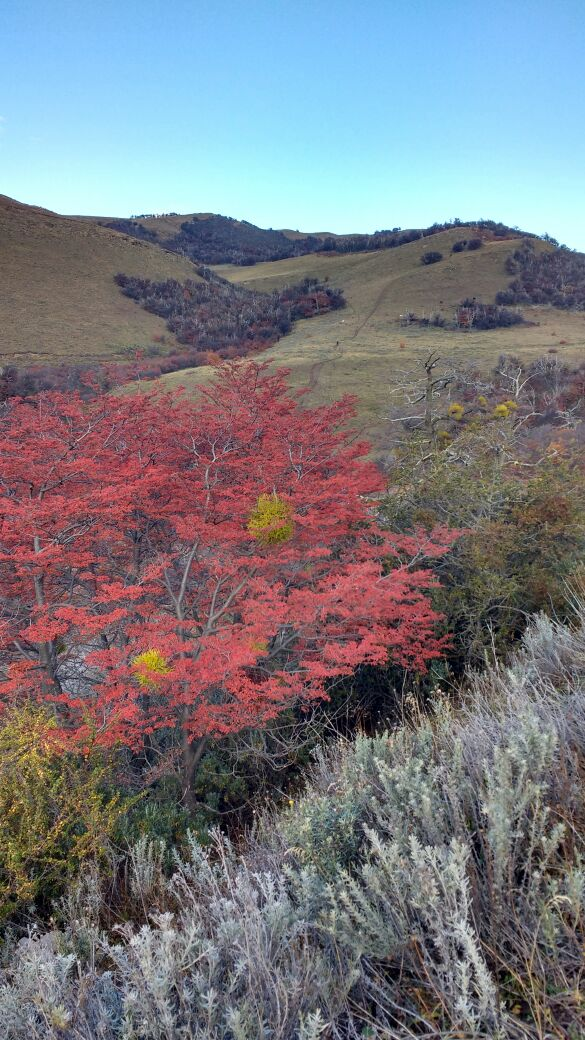 Lenga con tonos rojizos en época otoñal. La lenga es un árbol autóctono de la patagonia argentina y chilena.